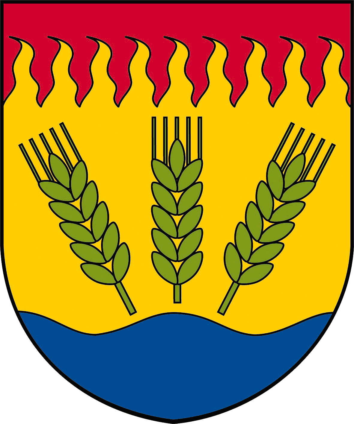 Žďár nad Orlicí, znak obce. Blason: Ve zlatém štítě mezi červenou plamennou hlavou a modrou vlnitou patou tři odkloněné zelené obilné klasy.